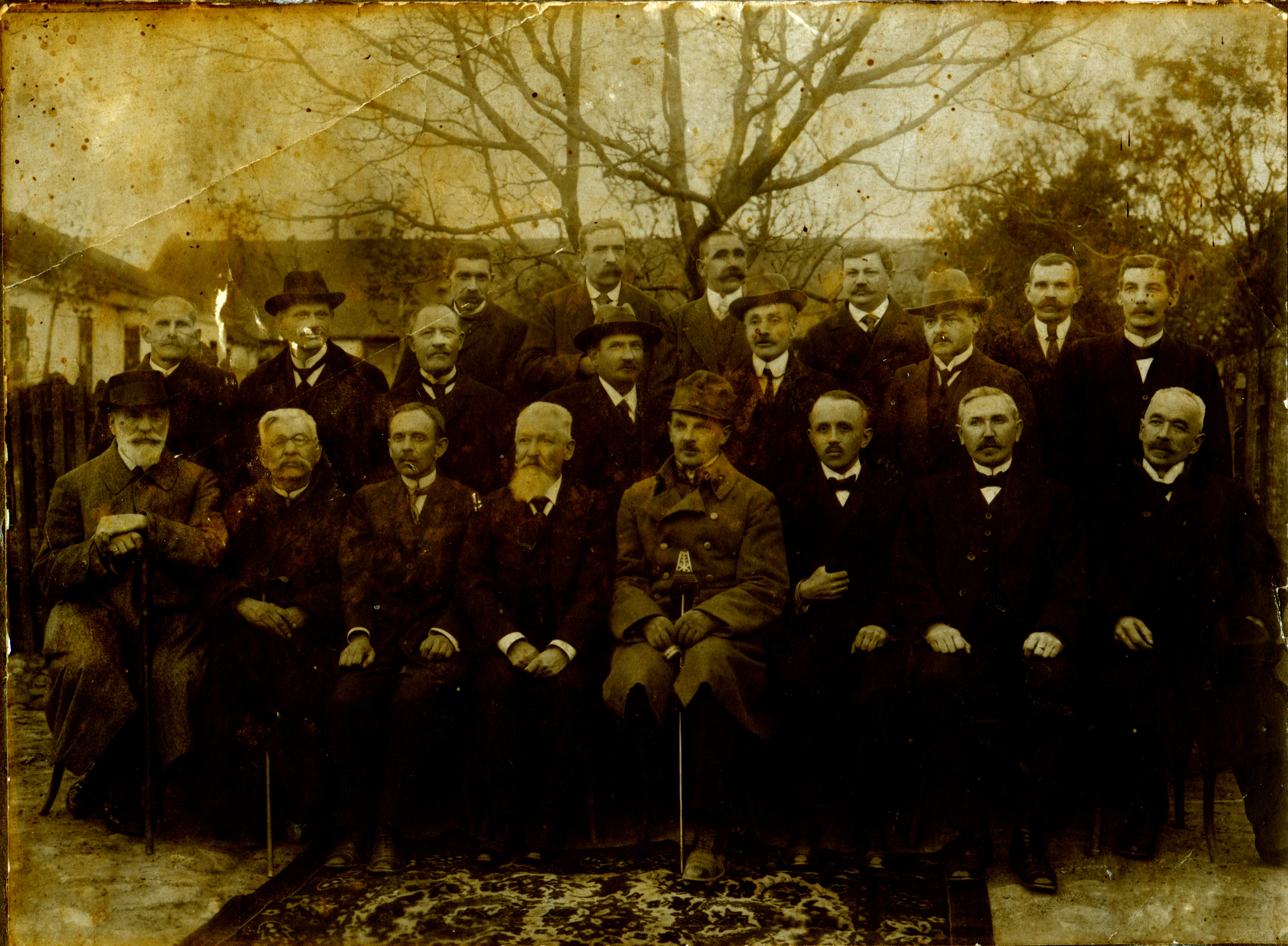 Pierwsza Rada Miejska miasta Busko z lat 1917-1918. Pierwsza Rada Miejsca w Busku w latach 1917 -1918. od lewej siedzą: - Damazy Filomen Prawdzic-Patek - aptekarz, - Aleksander Sadowski, - Eugeniusz Legutko- kierownik szkoły powszechnej, - Ludwik Jarczyński - kupiec, pierwszy burmistrz Buska w latach 1917-1918, - dr Stanisław Solański - komisarz cywilny, - Kazimierz Gałdziński - obrońca sądowy, burmistrz Buska w latach 1918-1939, - Władysław Śliwiński - wiceburmistrz Buska, - Józef Tomasiewicz - prezes OSP w latach 1908-1922. w drugim rzędzie stoją od lewej: - Edward Sendek,- kupiec członek Zarządu OSP, - Jan Barzykowski - dziedzic z Budzynia, pierwszy starosta stopnicki, - Wincenty Majewski -właściciel willi „Mickiewicz", członek Zarządu OSP, - Stefan Foltański - właściciel ziemski, - dr Antoni Sulimierski - członek Zarządu OSP, - Emil Buczwiński - felczer, uczestnik powstania 1863 r., - Karol Pawłowski - pierwszy naczelnik OSP. w trzecim rzędzie stoją od lewej: - Wojciech Ozdoba - rolnik ze wsi Nadole, - Jan Dytkowski - felczer, członek zarządu OSP, - Władysław Lewicki - wójt Buska, - Julian Gołębiowski - dziadek Krystyny Jamroz, - Mieczysław Pytlewski - właściciel zakładu mechanicznego, członek Zarządu OSP.